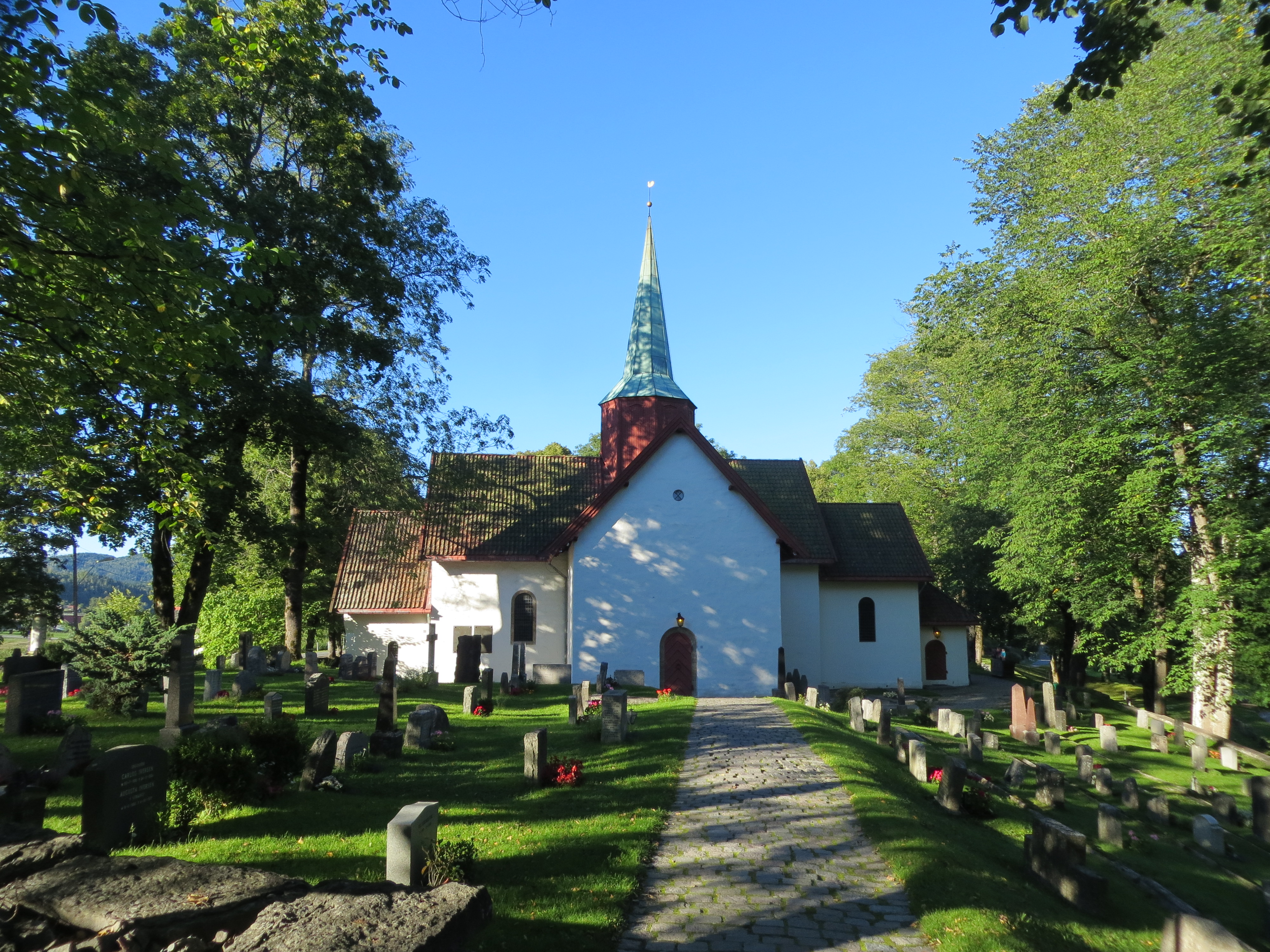 Haslum kirke, øst i Bærum, er en middelalderkirke.